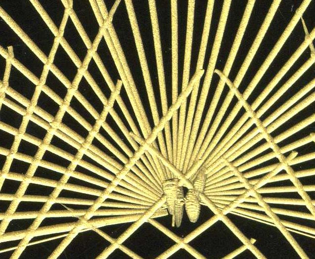 沈金（Image:Chinkin.jpgの拡大図）